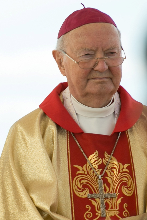 Bīskaps Antons Justs